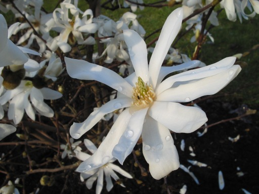 Magnolia stellata, 22 mars 2003, Jardin des Plantes de Paris.